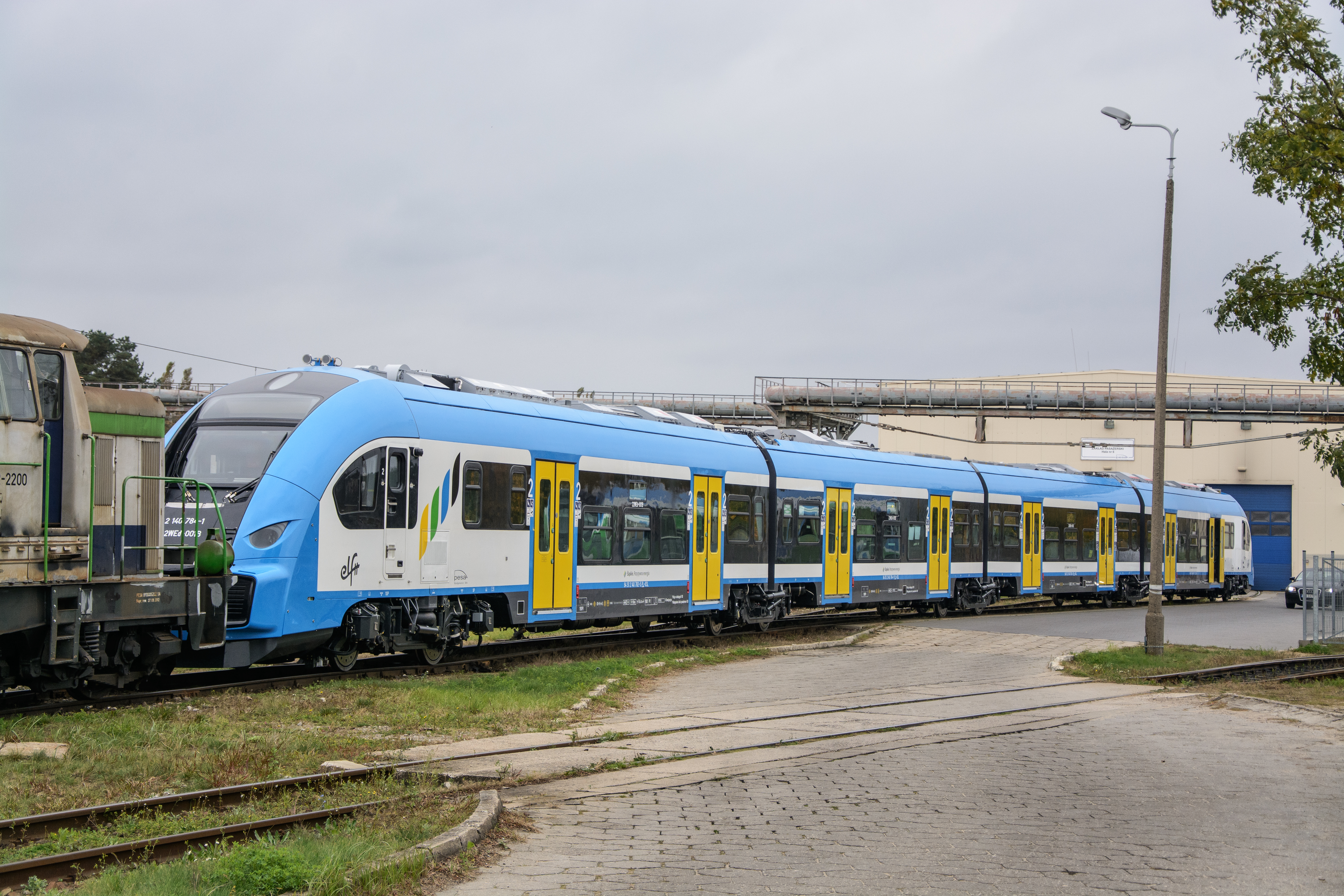 Elektryczny zespół trakcyjny Pesa Elf II 22WEd-001 dla Kolei Śląskich wyciągany przez lokomotywę spalinową SM42-2200 z hali nr 6 Zakładu Pasażerskiego Z-3 Pesy Bydgoszcz.